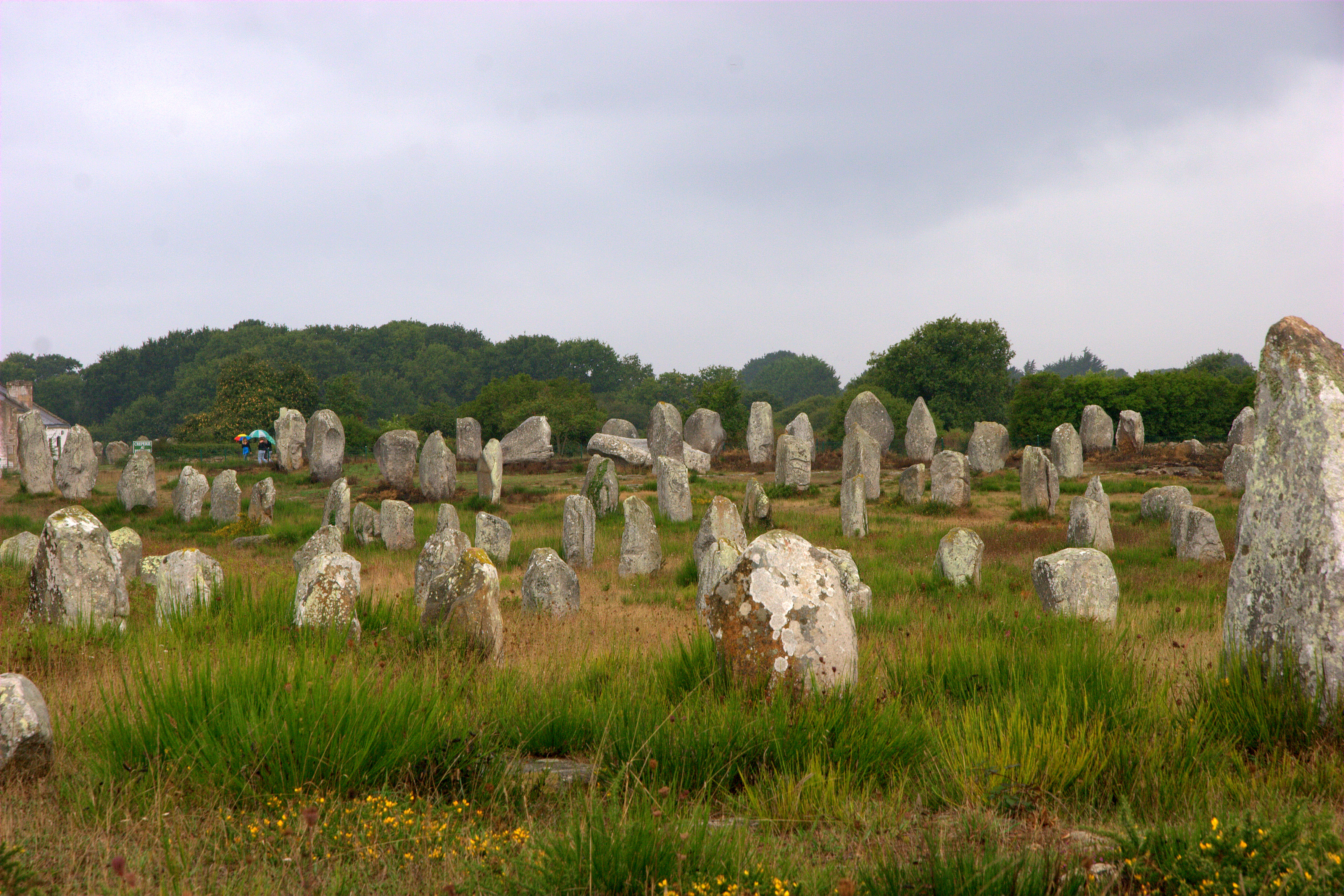 Die "Alignements" von Carnac sind das grösste prehistorische Denkmal der Bretagne. Tausende von Menhiren (aka Hinkelsteinen) stehen hier in Reihen.